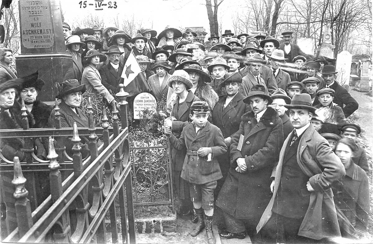 Esperantistoj el la Esperanto-rondo "Konkordo" ĉe la tombo de LLZ. En la centro estas Lidja Zamenhof.